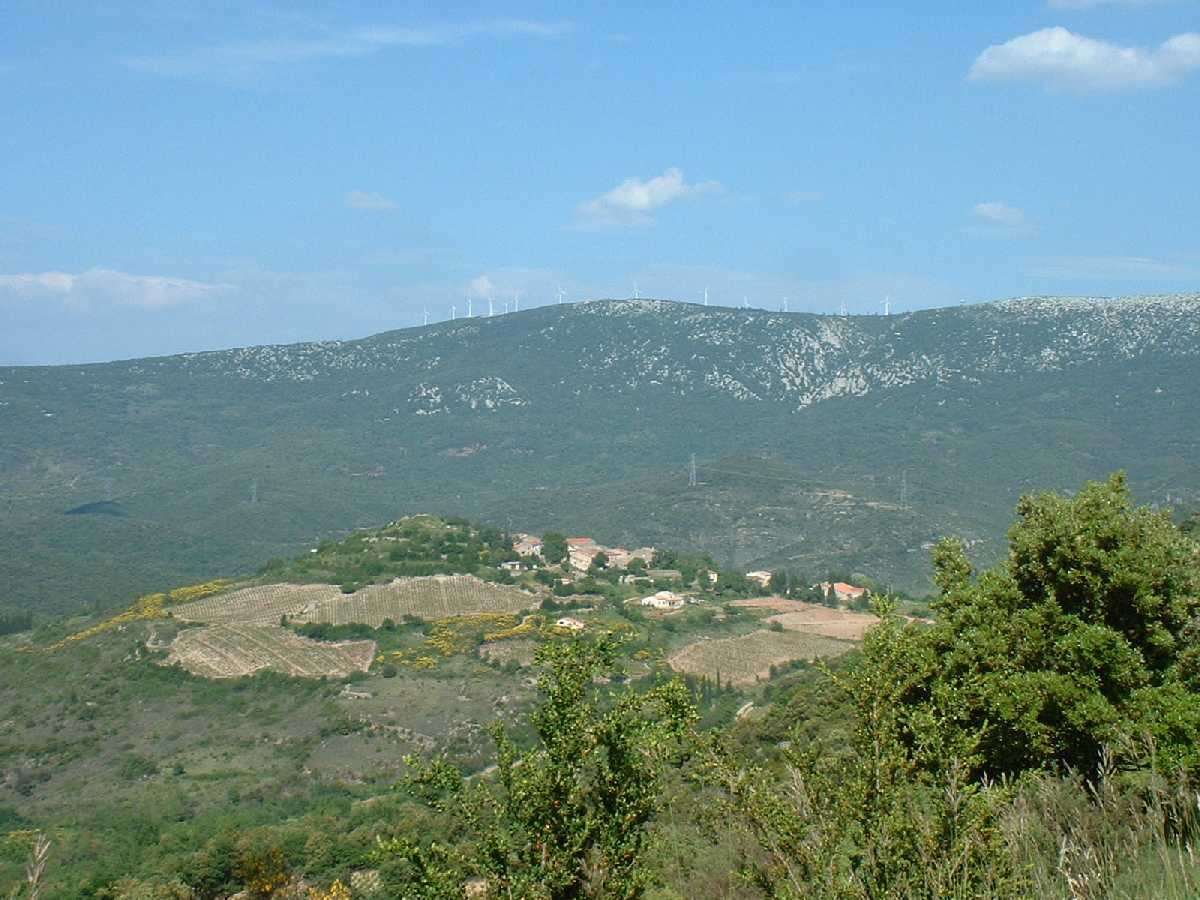 Montgaillard, le Tauch et ses éoliènnes